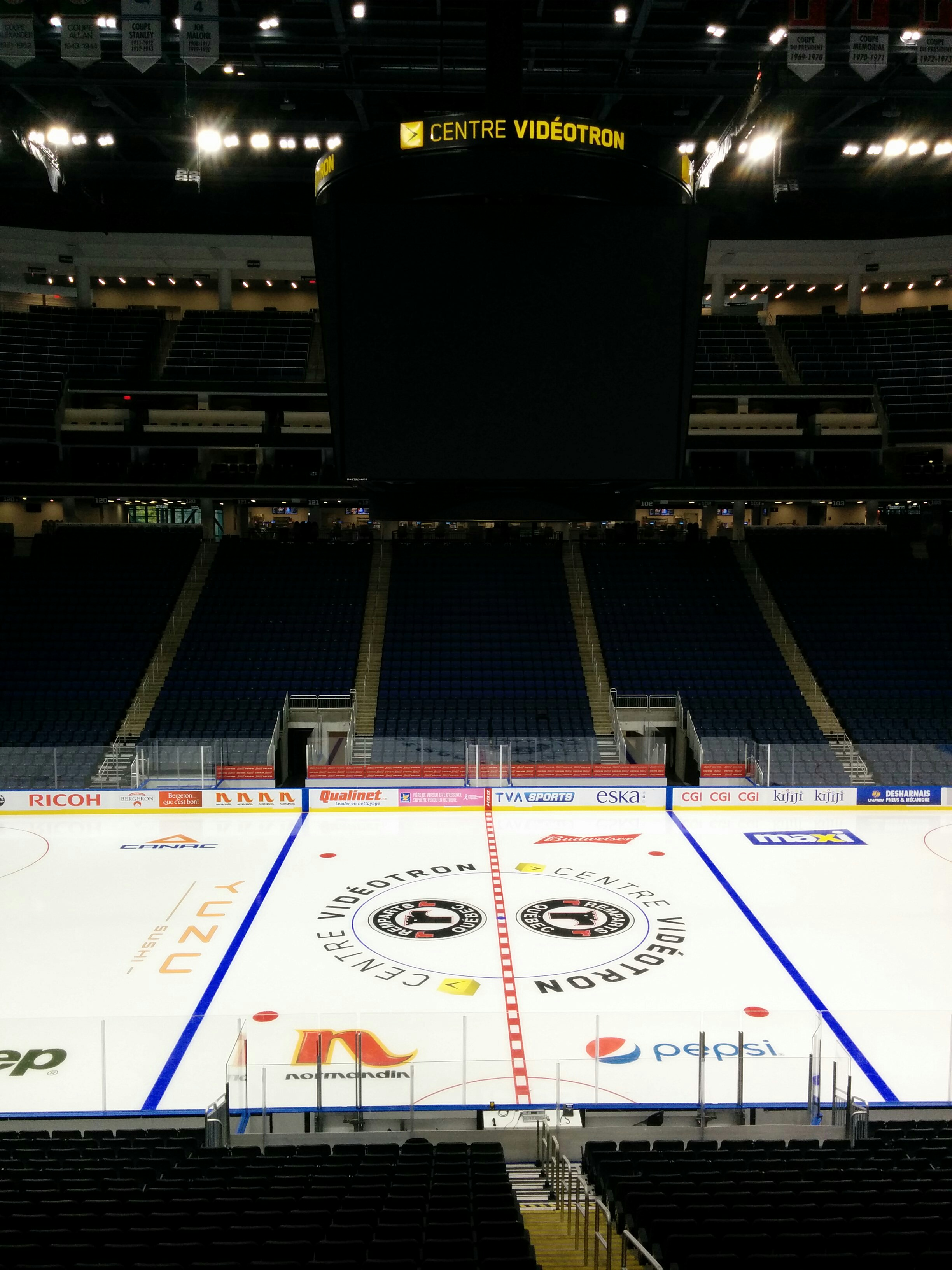 Vue de la zone centrale de la patinoire du Centre Vidéotron.